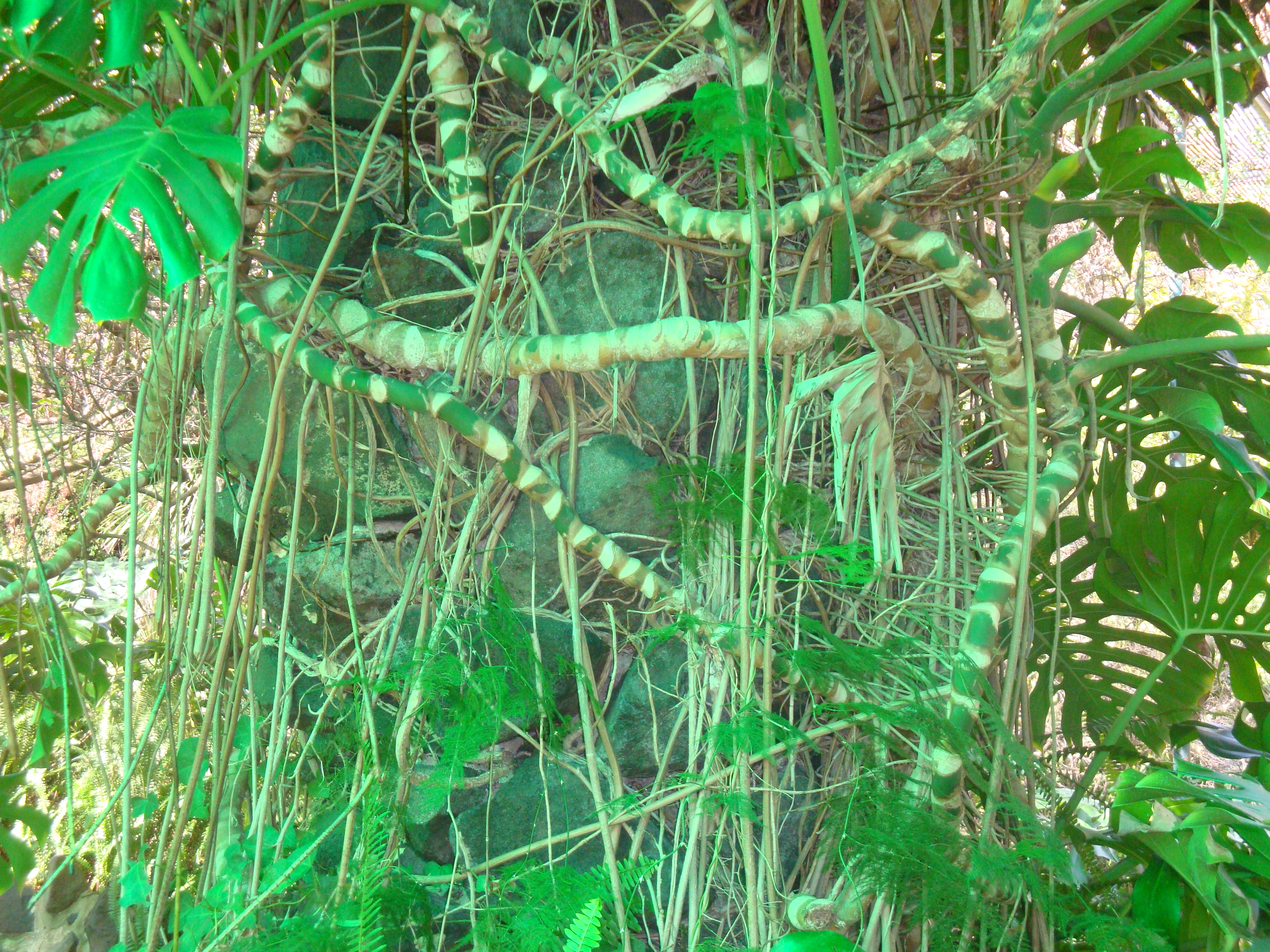 Monstera deliciosa